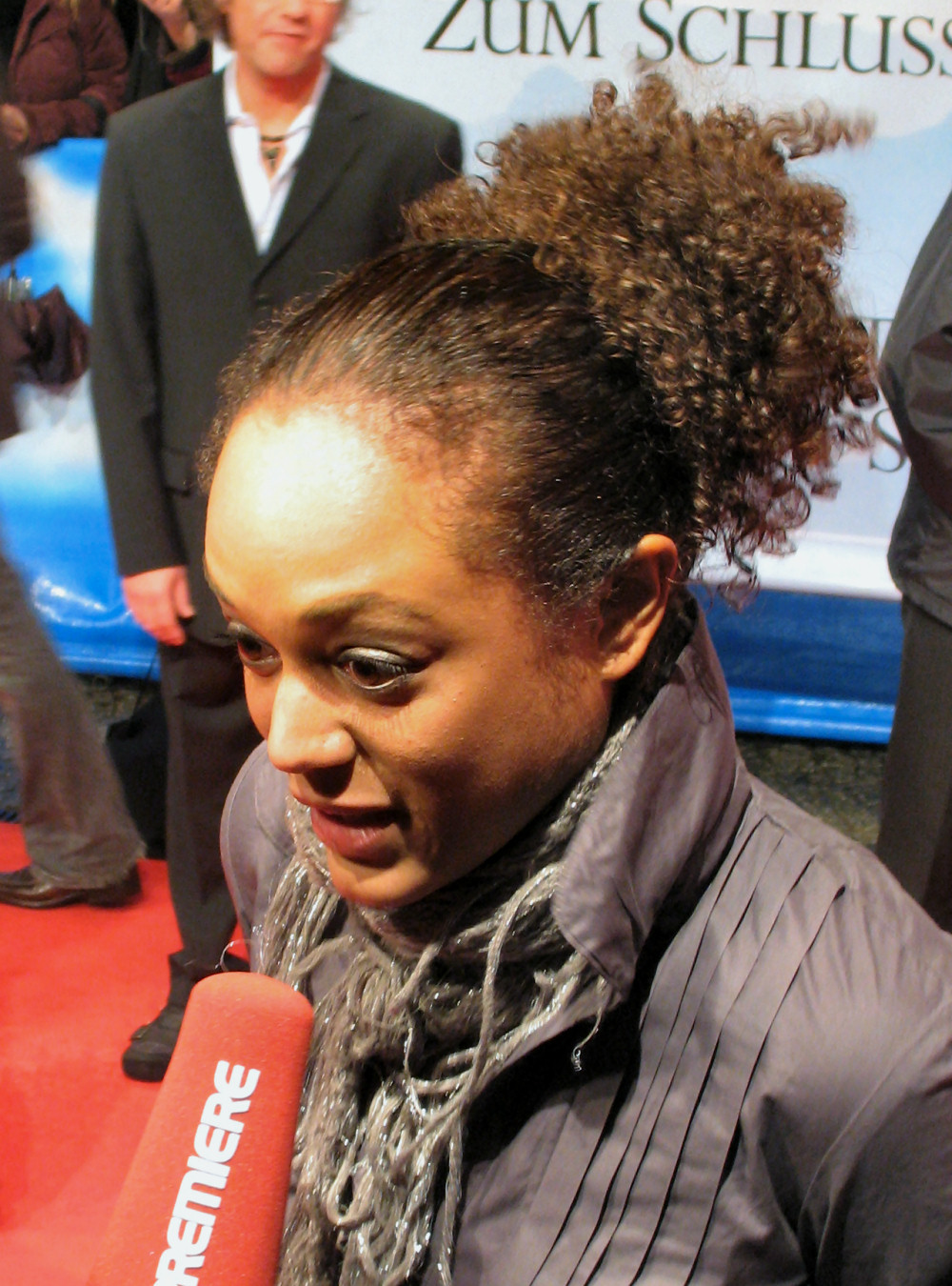 Milka Loff Fernandes bei der deutschen Filmpremiere The Bucket List, Berlin, 21. Januar 2008